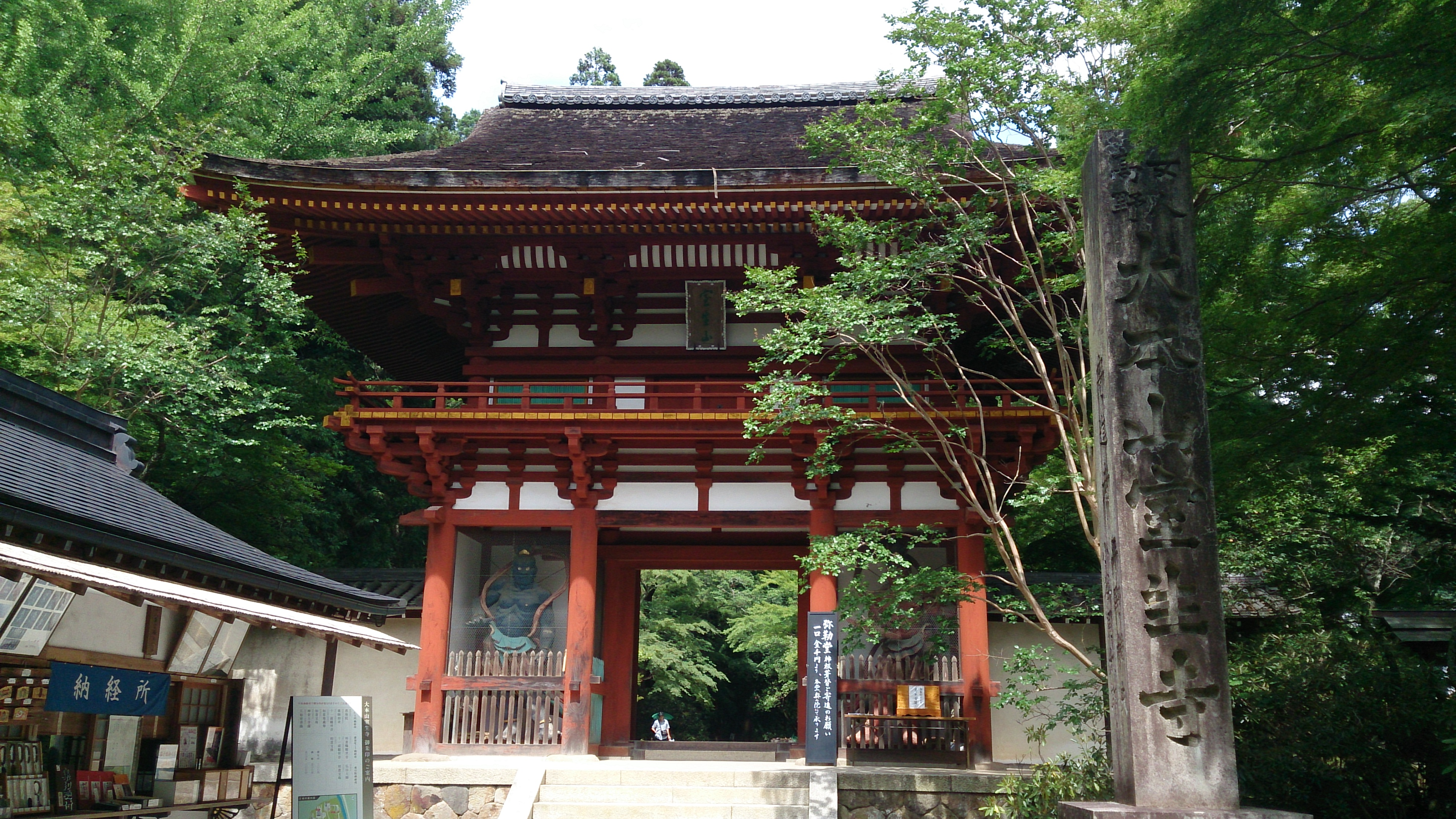 奈良県桜井市 室生寺 五重塔